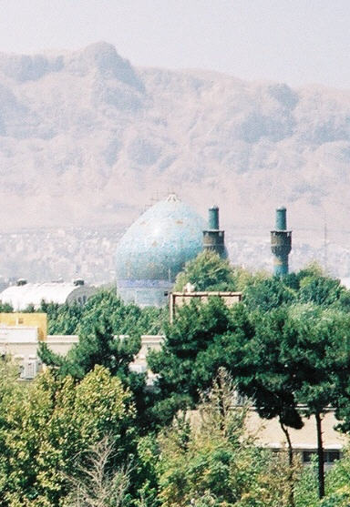 Une partie de la ville d'Ispahan vue depuis le toit du Palais d'`Ali Ghapu. Au premier plan le grand immeuble est l'Hotel Abbassi qui mérite une visite même si ce n'est pas pour y résider. Le Dôme est celui de la Madrasa de la mère du Chah nommée actuellement Madrasa Chahar Bâgh